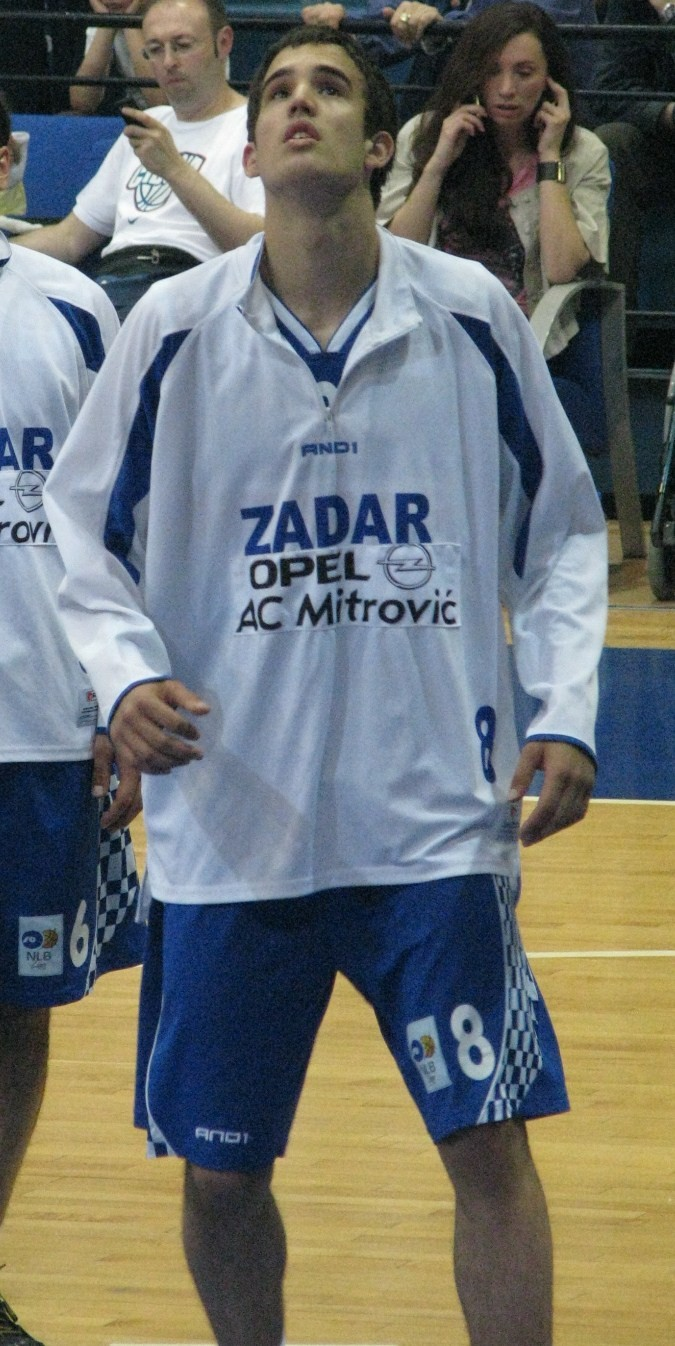 Ivan Batur